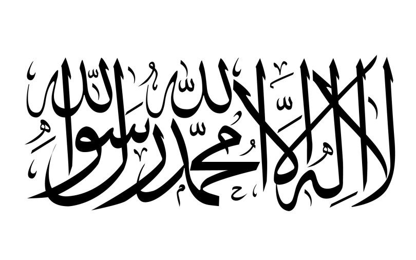 Inscripción de la mezquita mayor de Barcelona